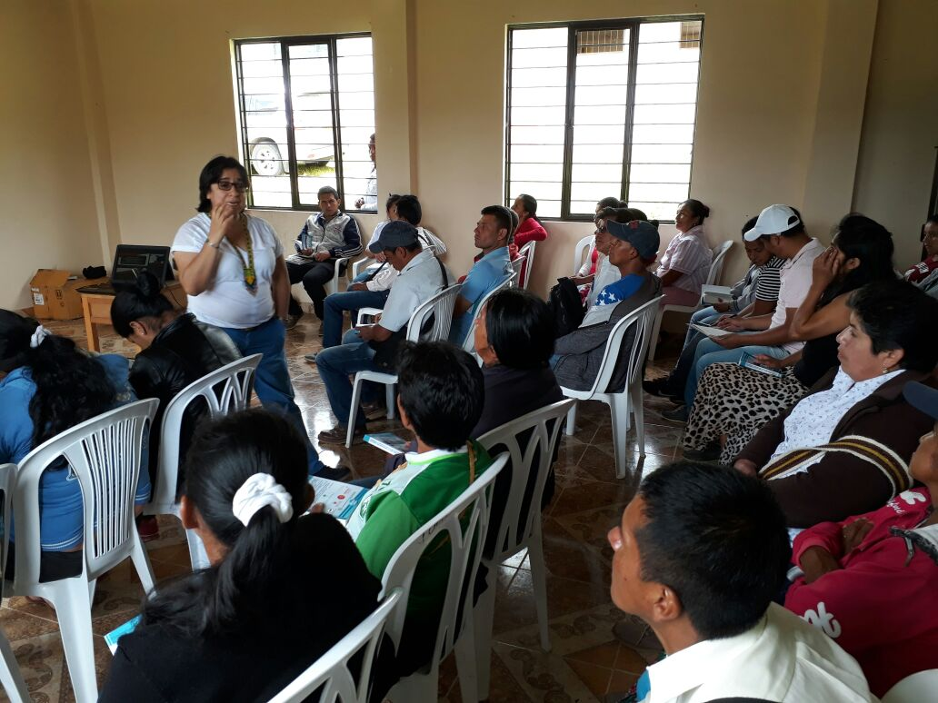 Judith Maldonado, integrante de Voces de Paz y Reconciliación